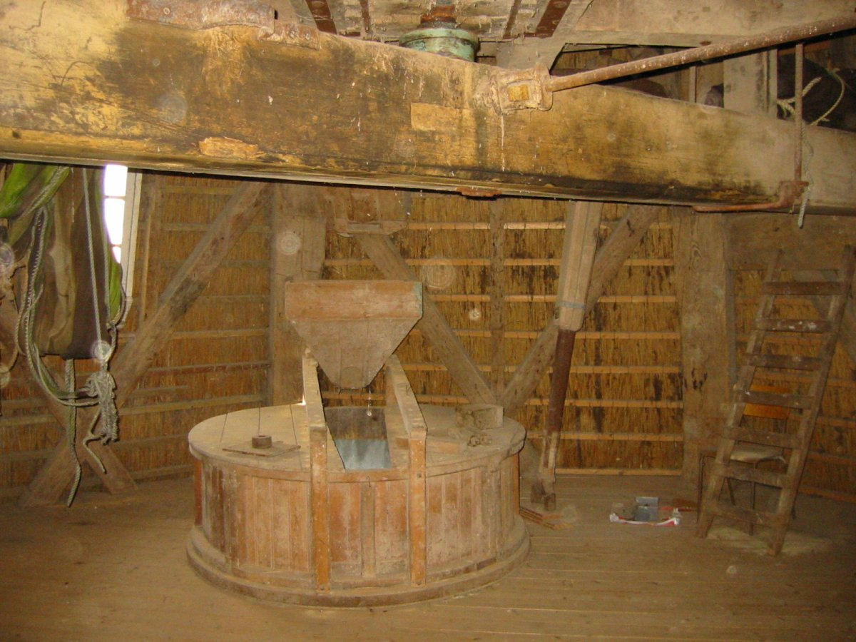 De Kraai/ Ten-Bruggencatenummer: 01146: Interieur van achtkante stellingmolen (opmerking: Foto gemaakt in het kader van het project Actualisering Monumentenregister (AMR).)